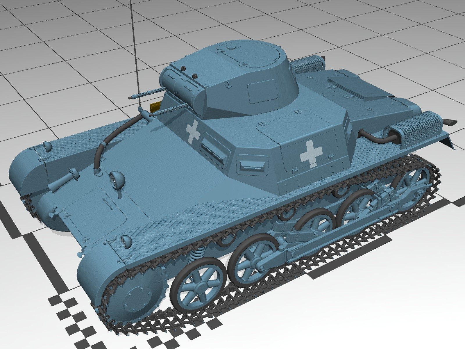 PanzerKampfwagen I B (3D model, isometric view)